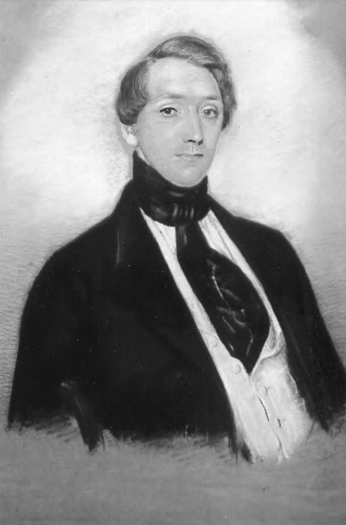 Gemälde zeigt Ferdinand Klitzing als jungen Bürgermeister von Plau.